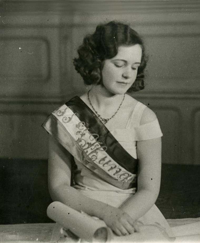 Tasnády Fekete Mária színésznő, Miss Hungária 1931-ben